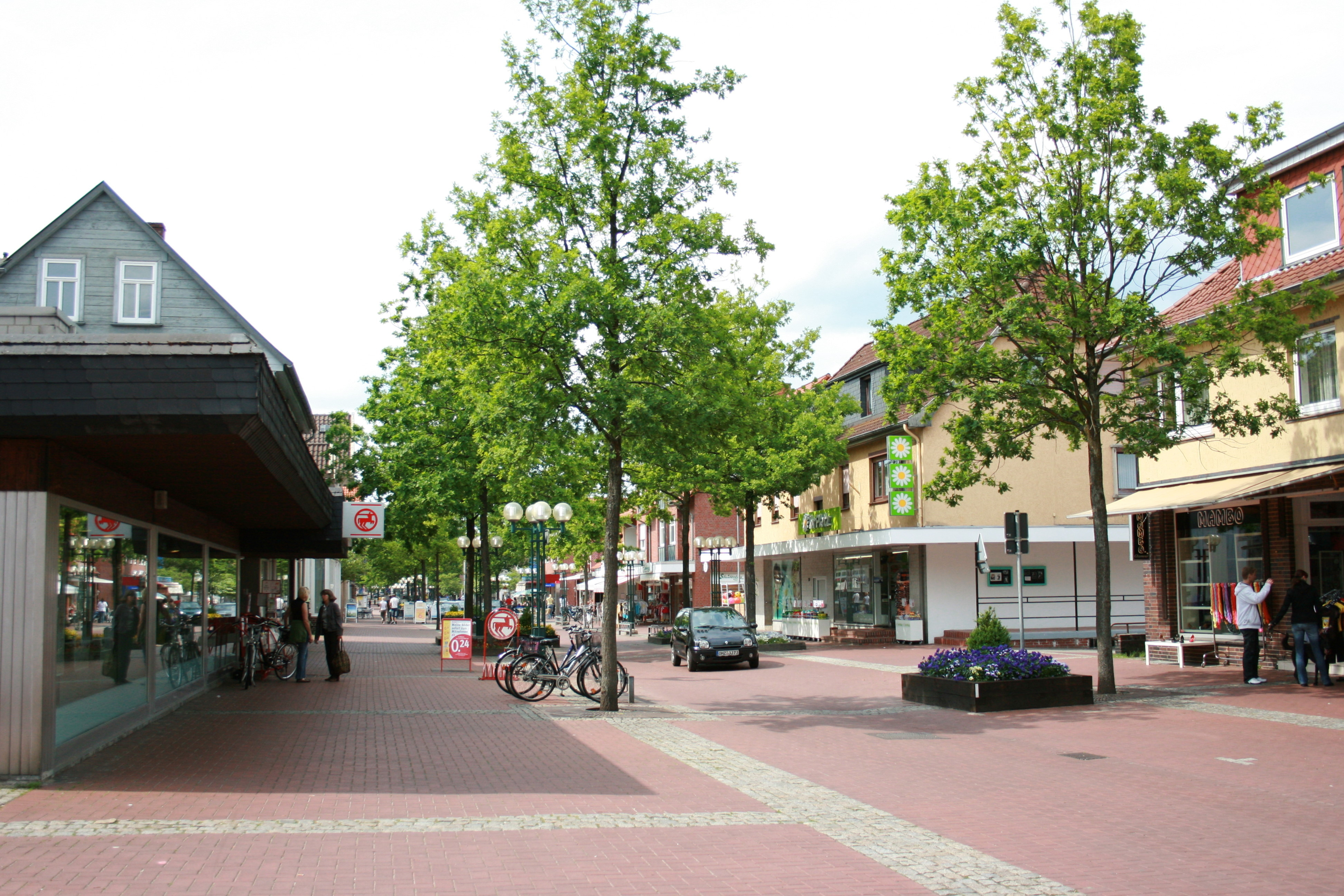 Wilhelm-Bockelmann-Straße in Munster (Örtze)